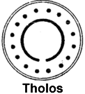 Esquema de un Tholos